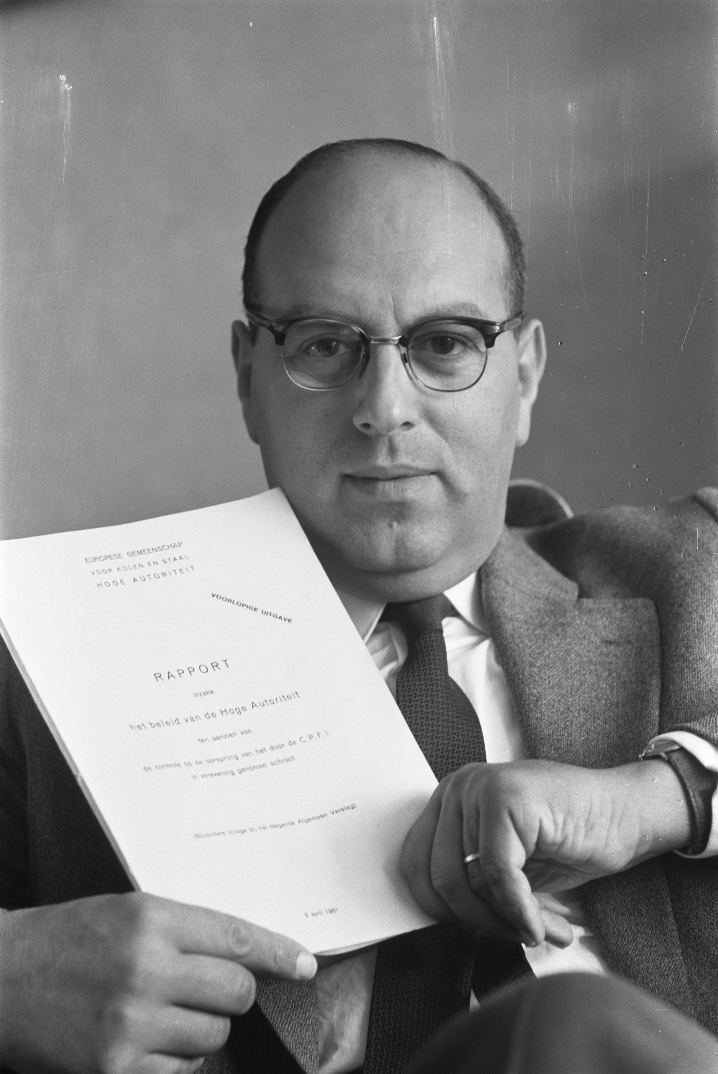 Collectie / Archief : Fotocollectie Anefo Reportage / Serie : [ onbekend ] Beschrijving : Schrootaffaire Worms. Hr. L. Worms Datum : 25 mei 1961 Persoonsnaam : WORMS Fotograaf : Pot, Harry / Anefo Auteursrechthebbende : Nationaal Archief Materiaalsoort : Negatief (zwart/wit) Nummer archiefinventaris : bekijk toegang 2.24.01.05 Bestanddeelnummer : 912-5204